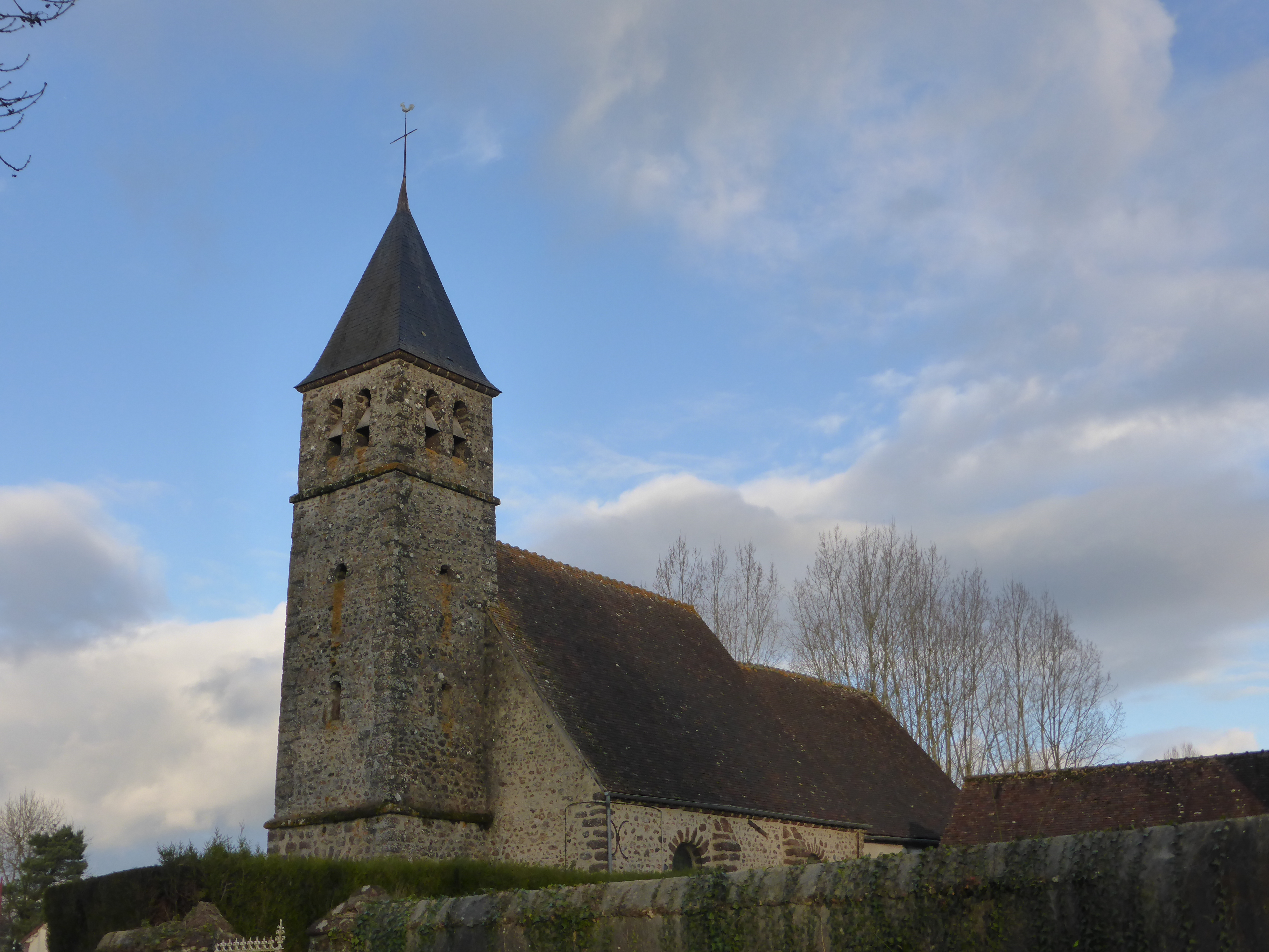 Église Saint-Laumer du Pas-Saint-l'Homer, dans l'Orne